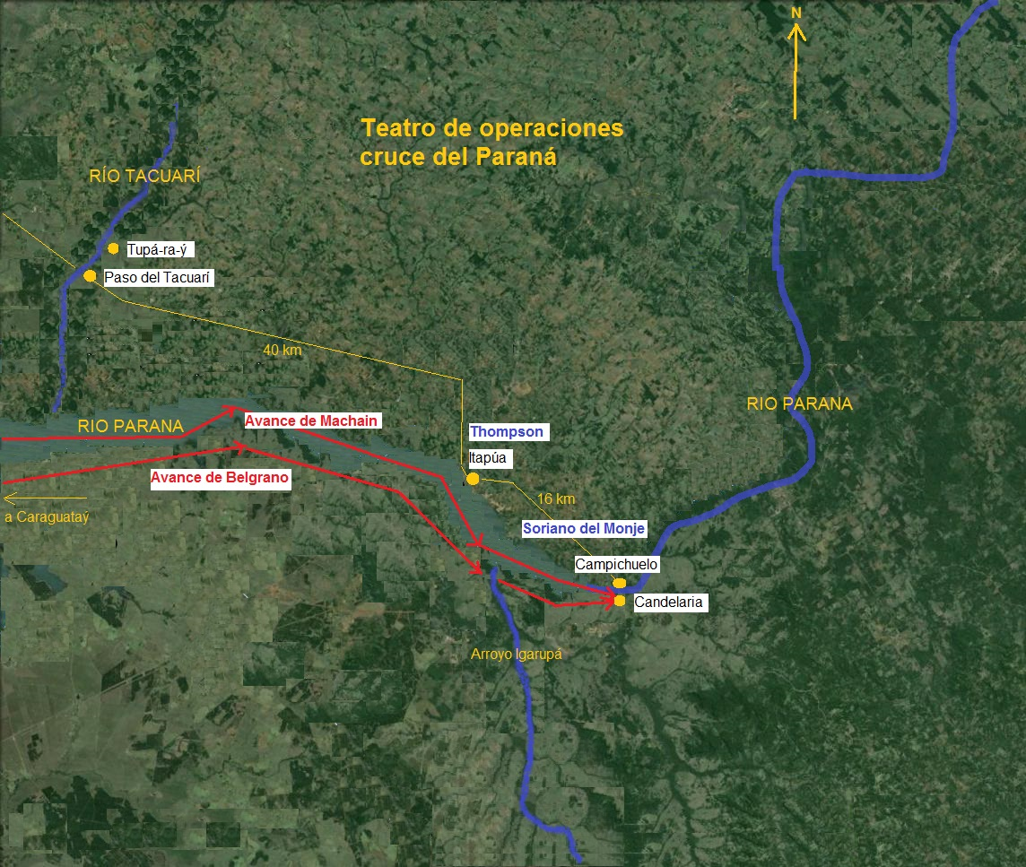 Expedición militar de la junta de Buenos Aires al Paraguay. Cruce del río Paraná.